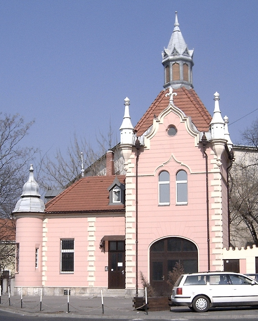 Az egykori vámház Győr-Újvárosban (Győr-Moson-Sopron megye)